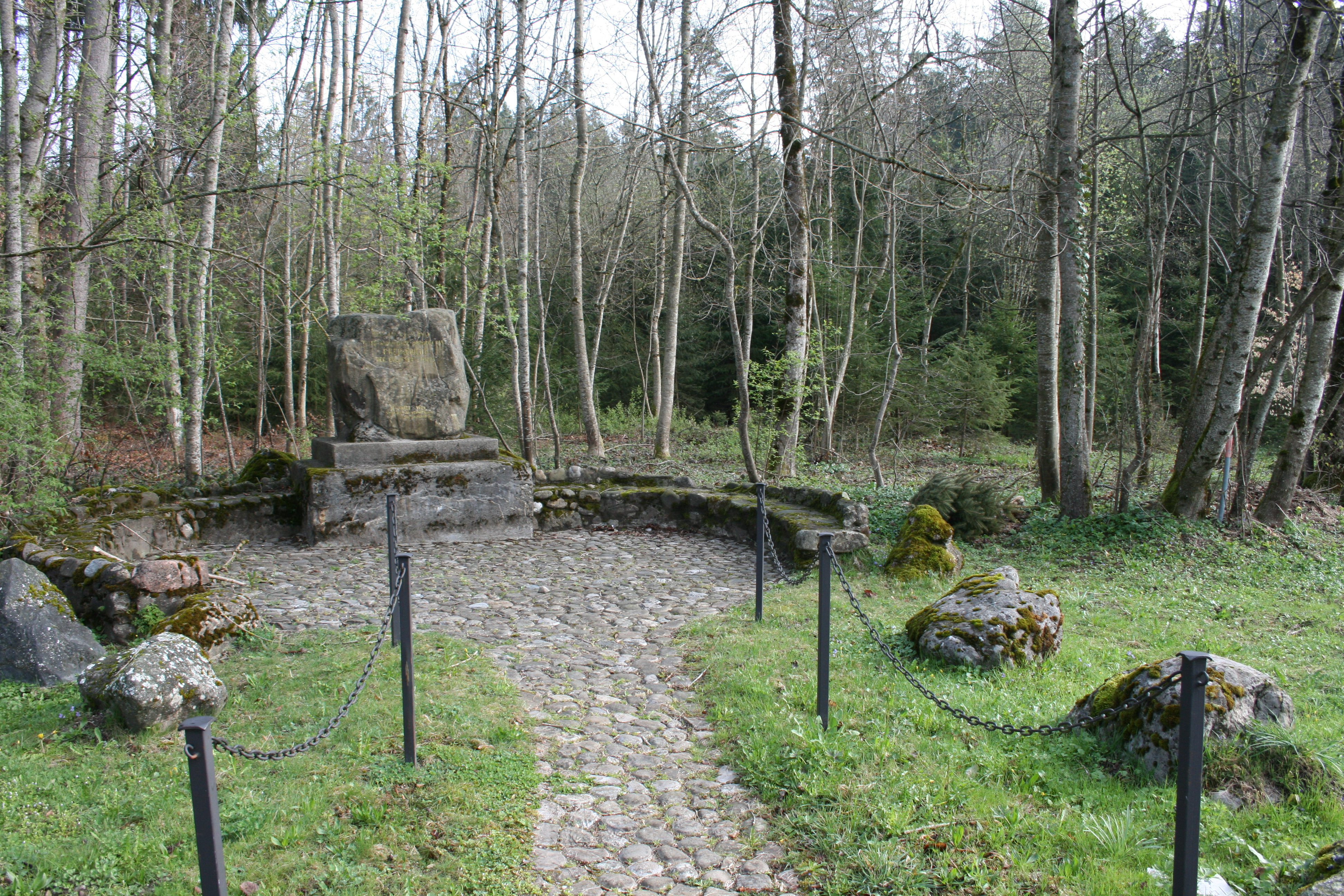 Freigericht